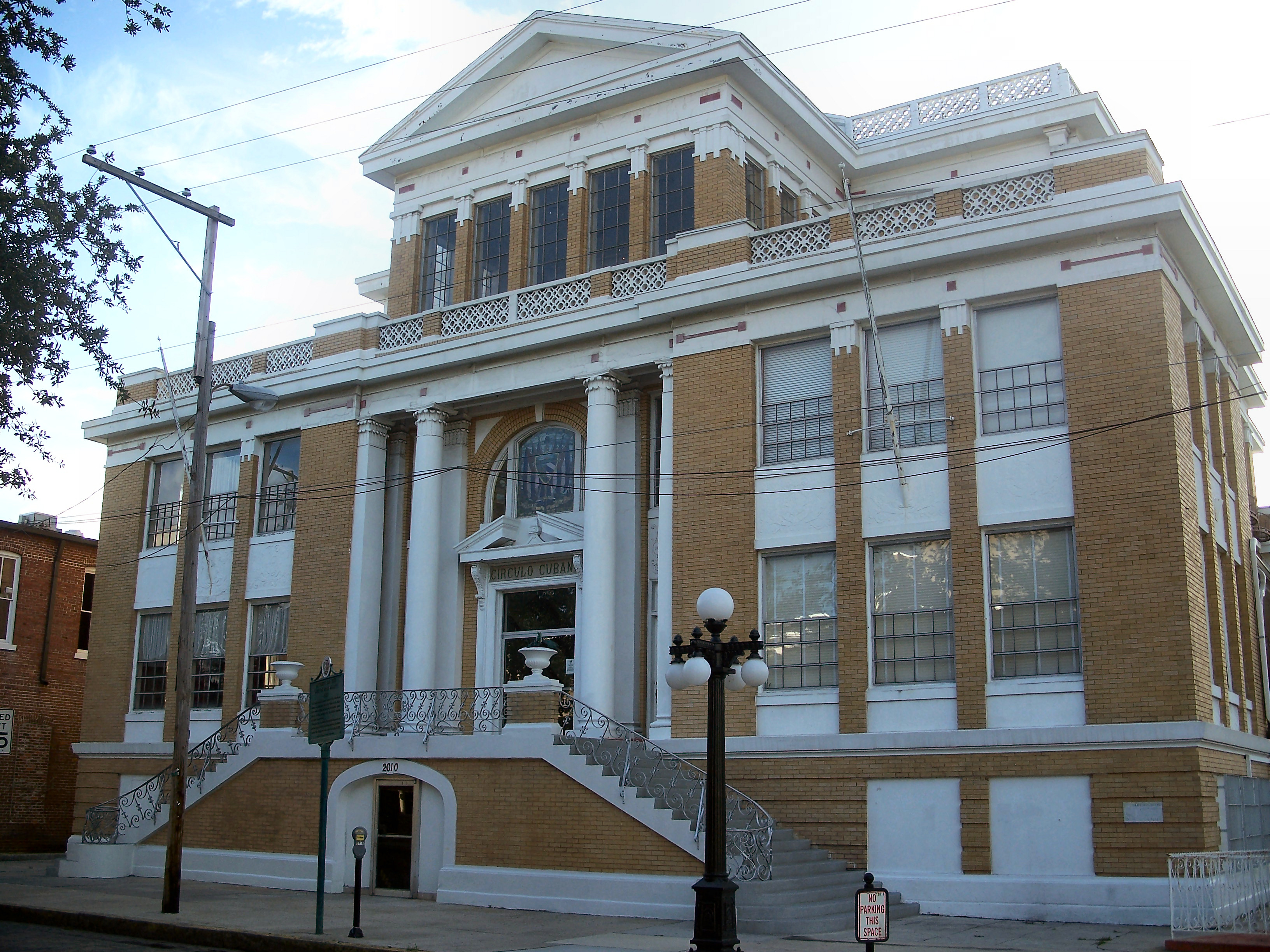 Circulo Cubano de Tampa (Cuban Club), in Tampa, Florida